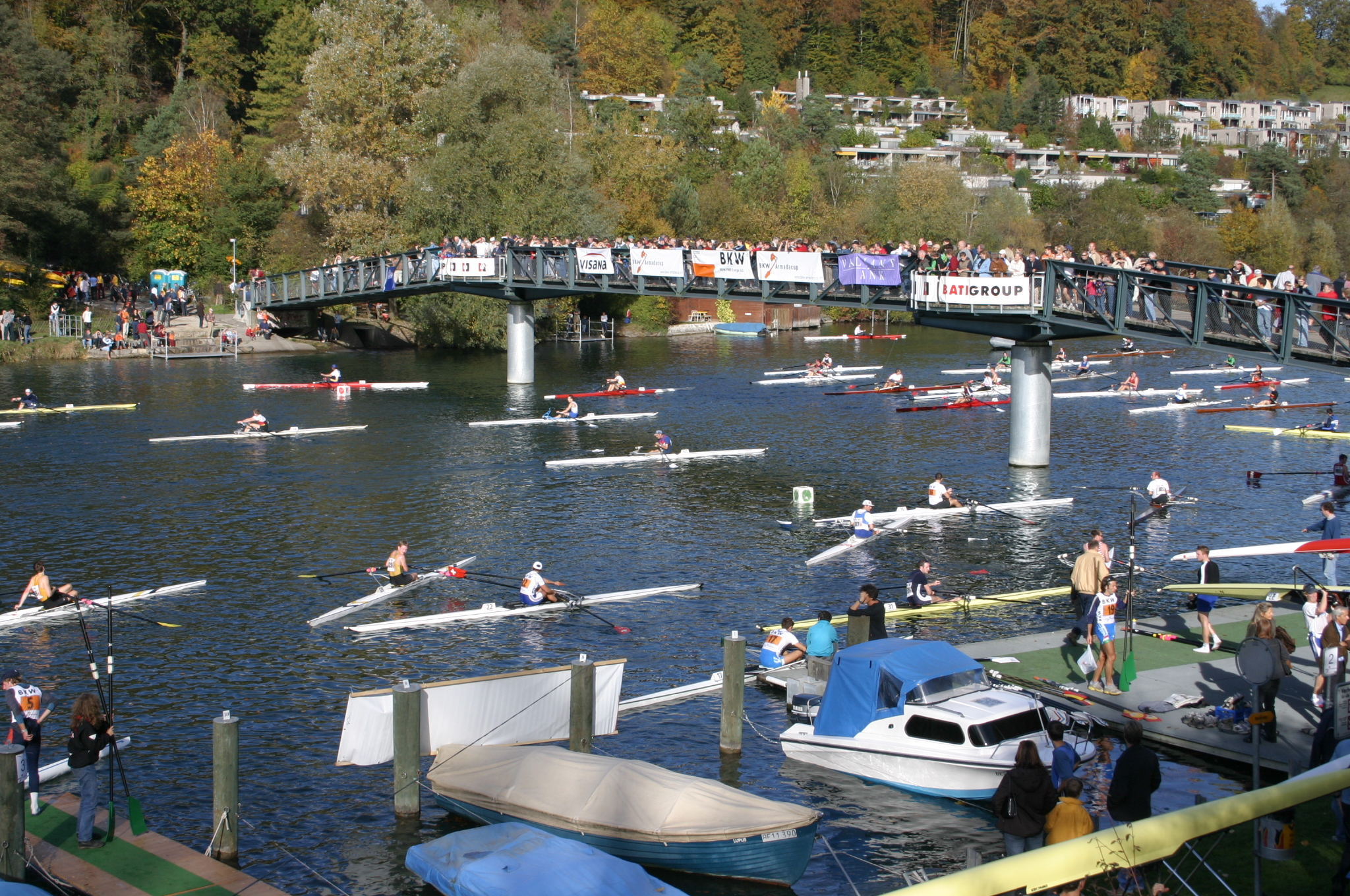 regattastimmung vor dem Bootshaus